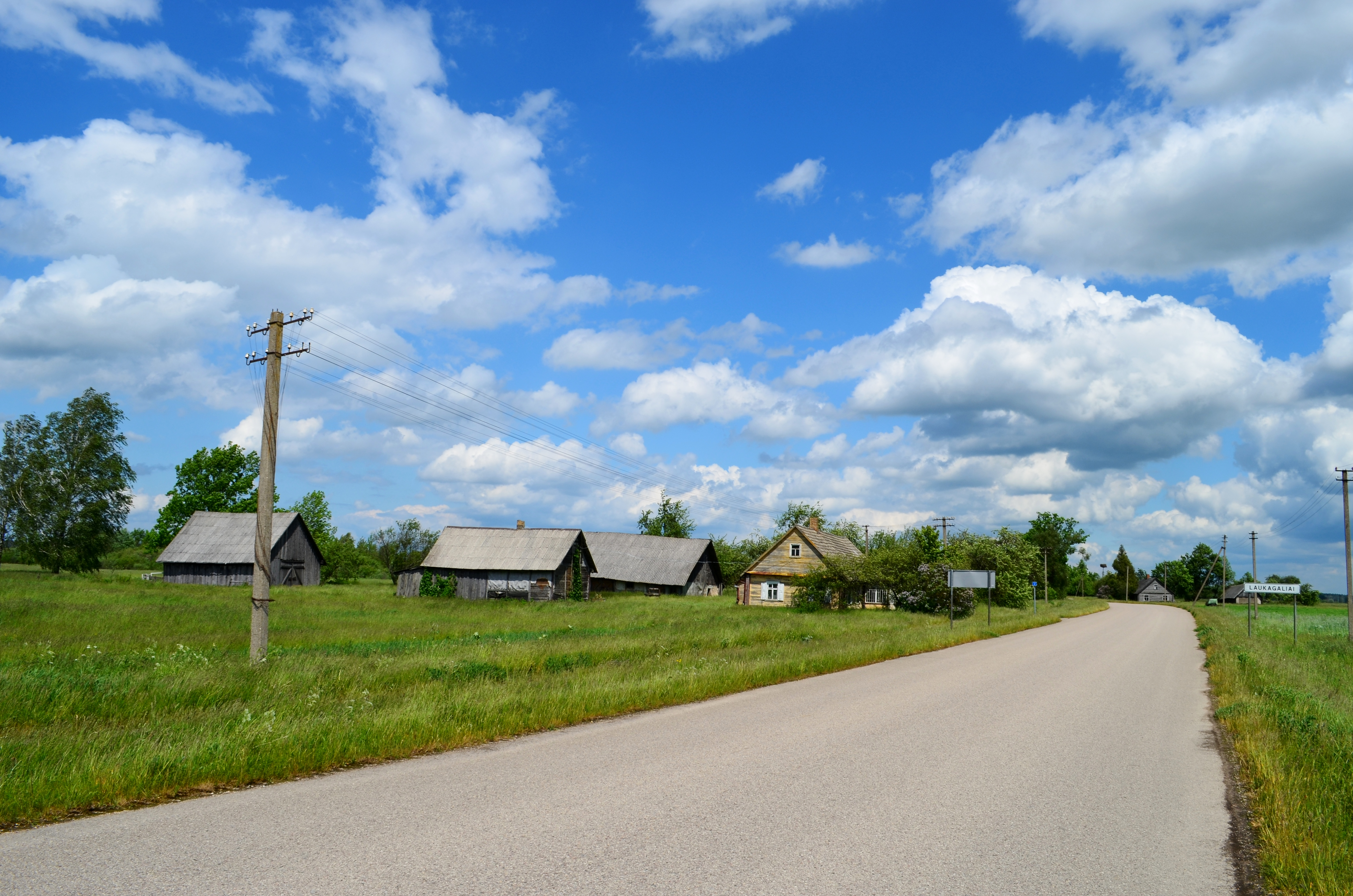 Laukagaliai, Anykščių raj.